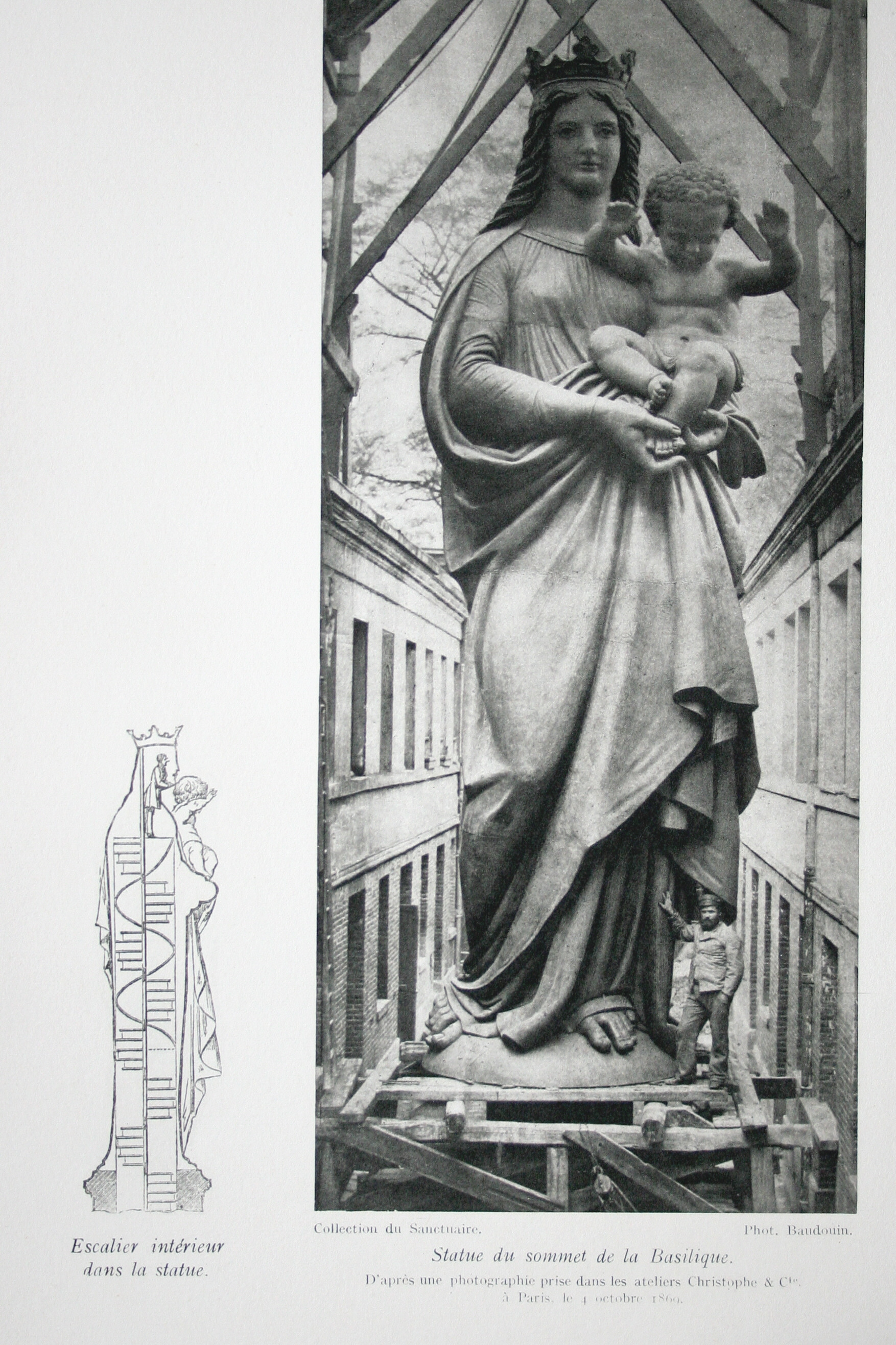 Photographie de la vierge de la garde prise dans les ateliers Christophe vers 1869 avant la livraison à Marseille. En bas à gauche coupe de la statue.